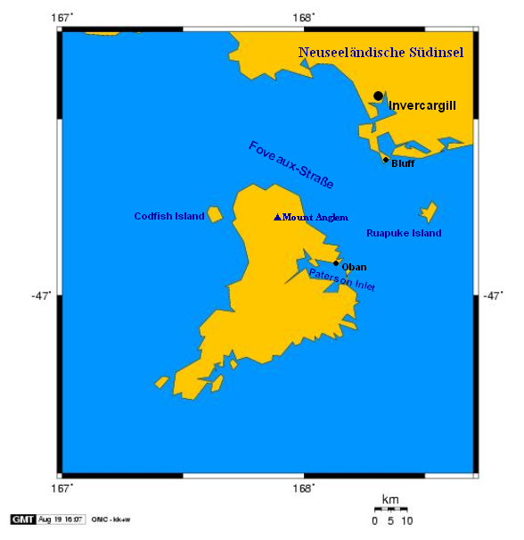 Taran TMD